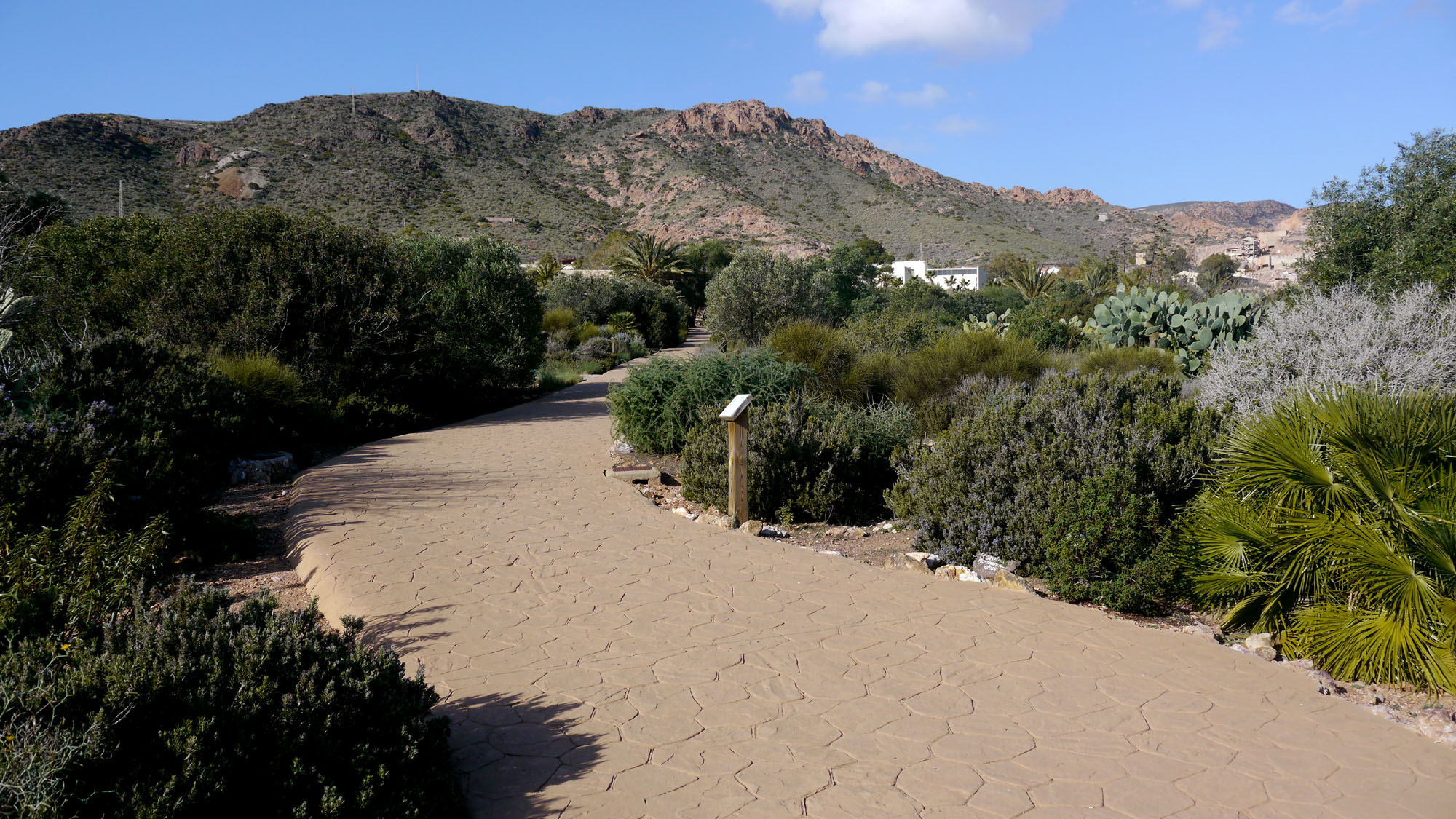 Jardín botánico de flora autóctona del Cabo de Gata y Almería 'El Albardinal' en Rodalquilar, Almería, España.